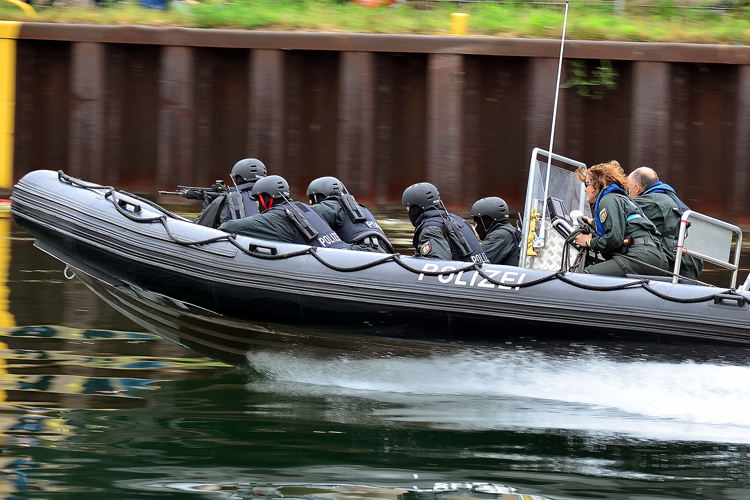 Landespolizeifest NRW 2013, Dortmund, Datum/Uhrzeit: 13.07.2013 12:29:31